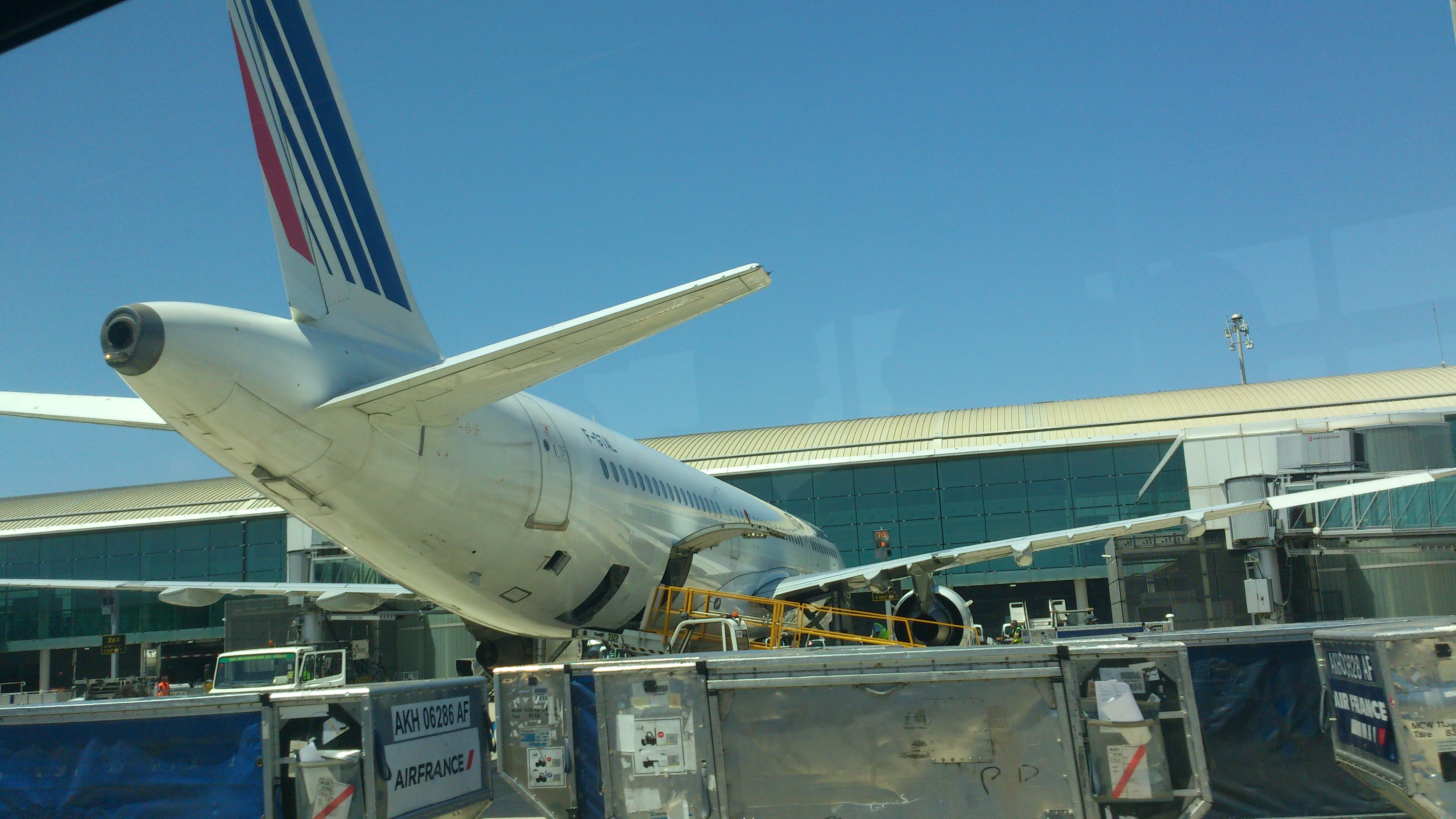 Barcelona Airport